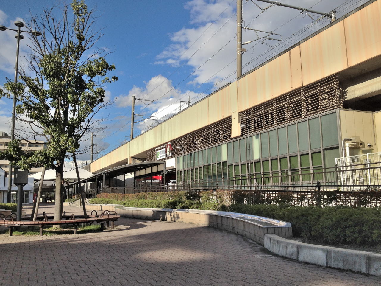 JR東日本 長町駅 西口